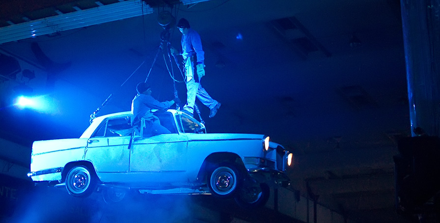 Fuerzabruta en / Fotos: María Paula Pia